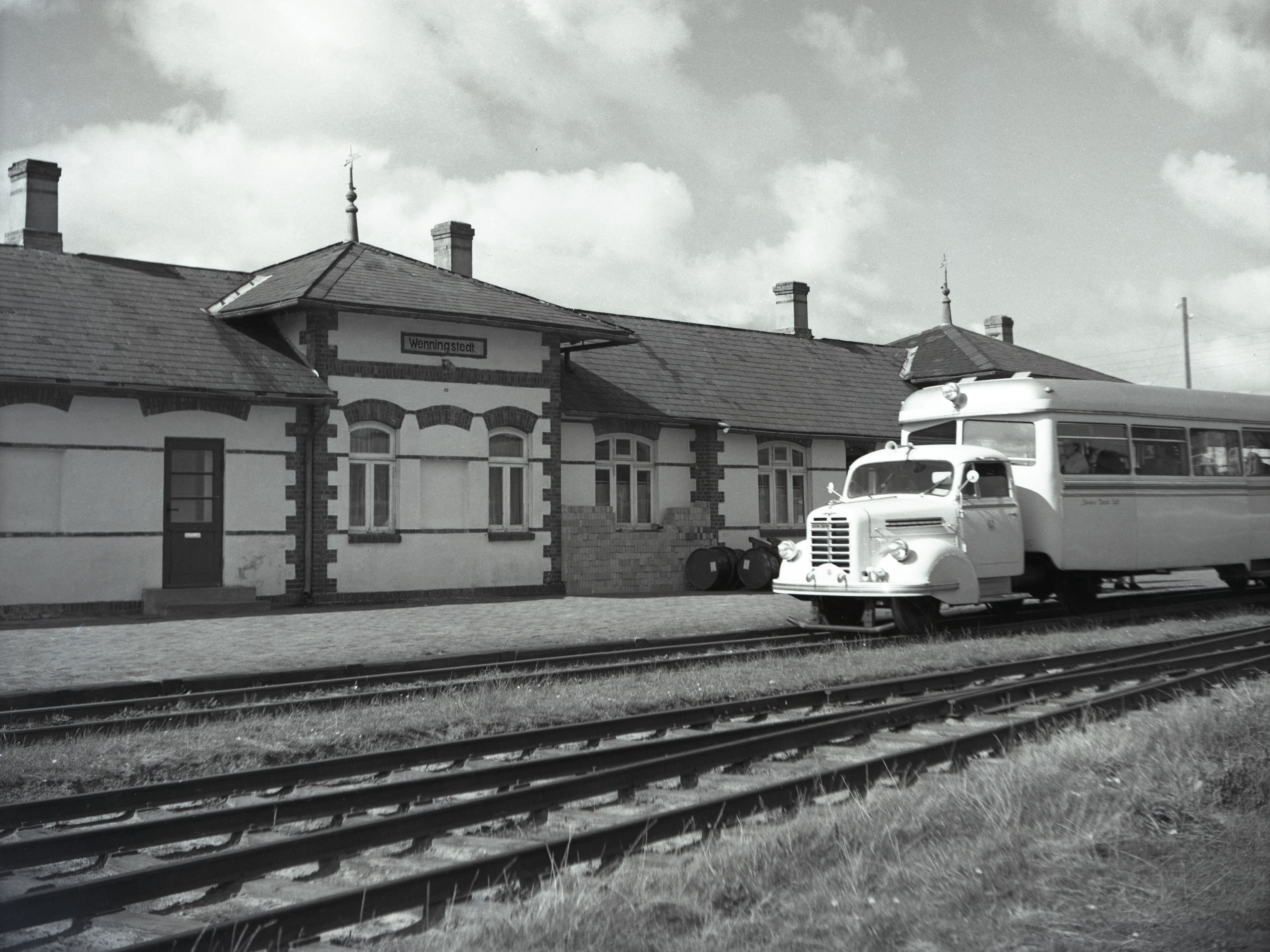 Gleisseite des Bahnhofs Wenningstedt der Sylter Inselbahn mit Triebwagen.